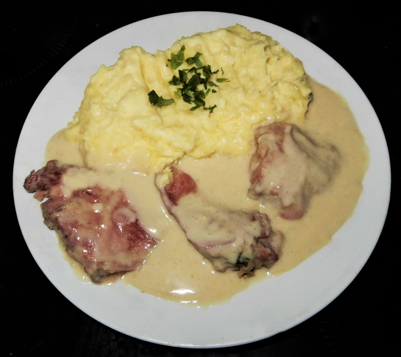 Rindszunge in Sahnesauce